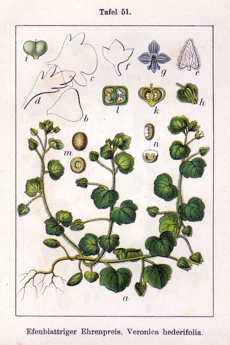 Veronica hederifolia L. s. l. Original Description Efeublättriger Ehrenpreis, Veronica hederifolia